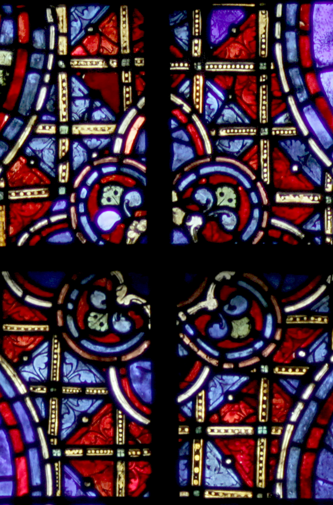 le zodiaque et les travaux des mois (lancette gauche, baie 28a).